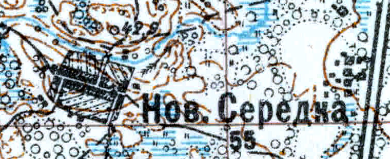 Топографическая карта Ленинградской области, квадрат VIc-28 (Луга), деревня Новая Серёдка